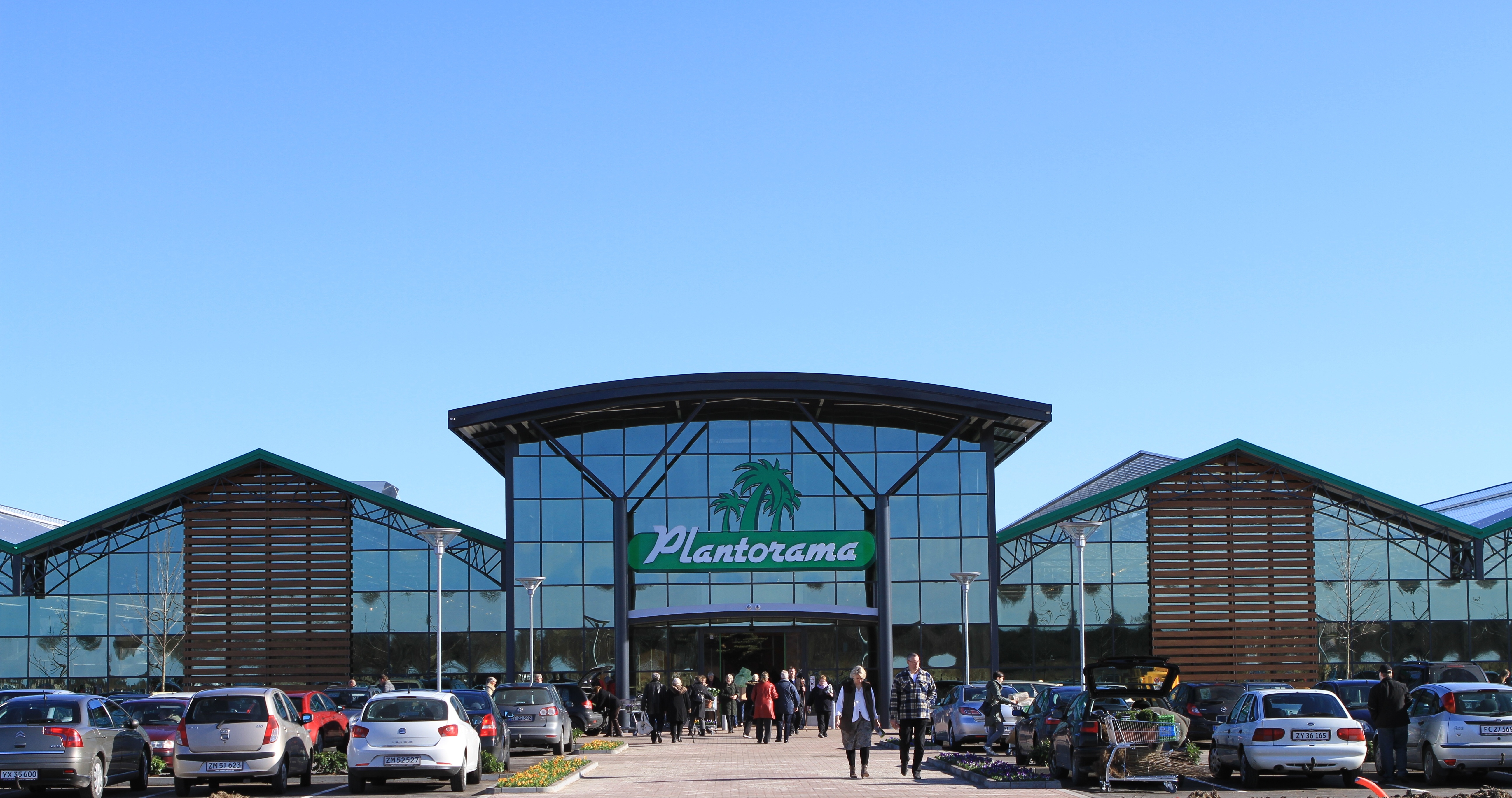 Plantorama Havecenter in Hillerød DK. Largest indoor garden centre in Scandinavia covering 10.000 sq m.